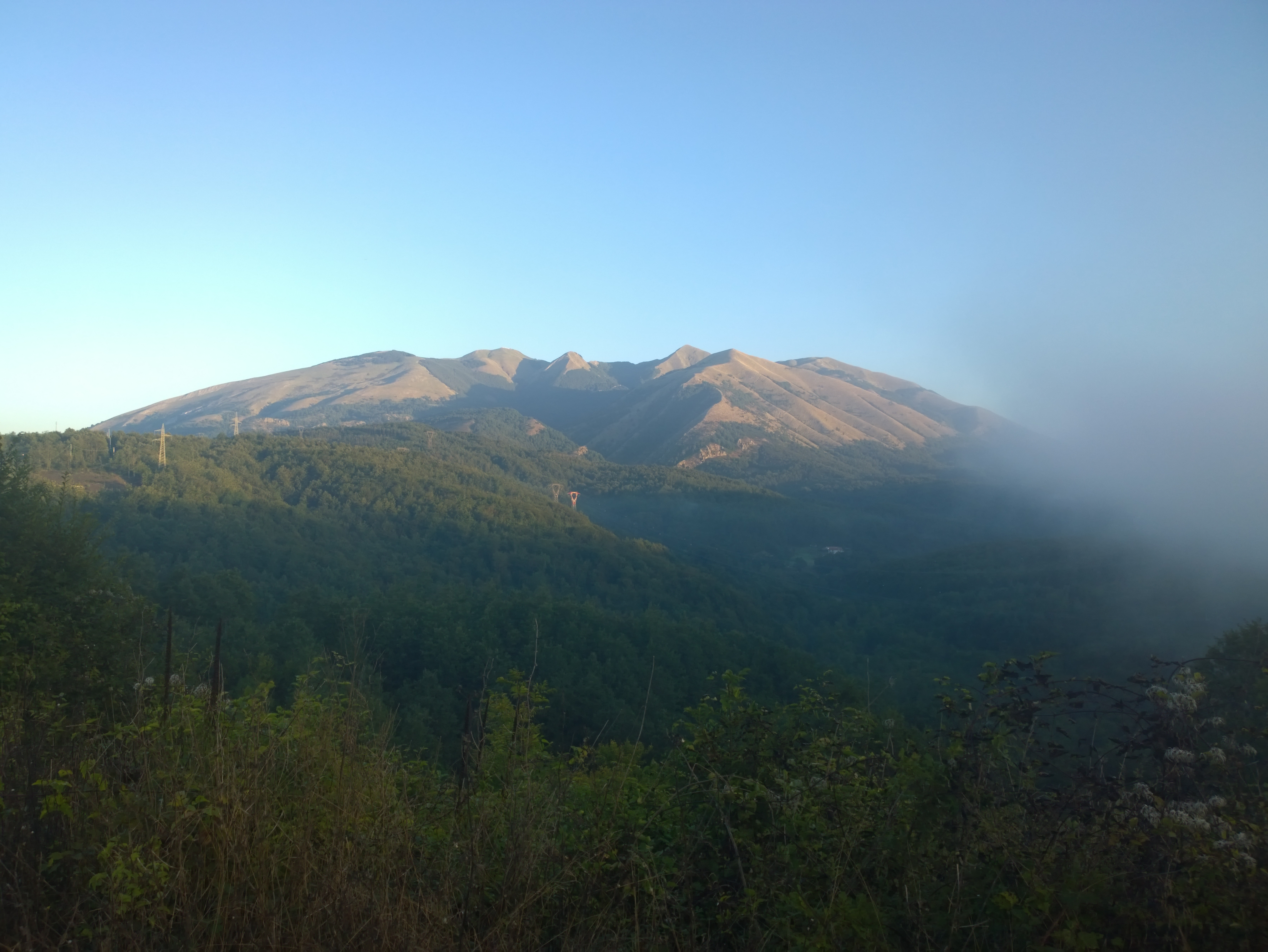 Massiccio del Sirino visto nei pressi dello svincolo autostradale di Lauria Nord dell'A3 Napoli – Reggio Calabria